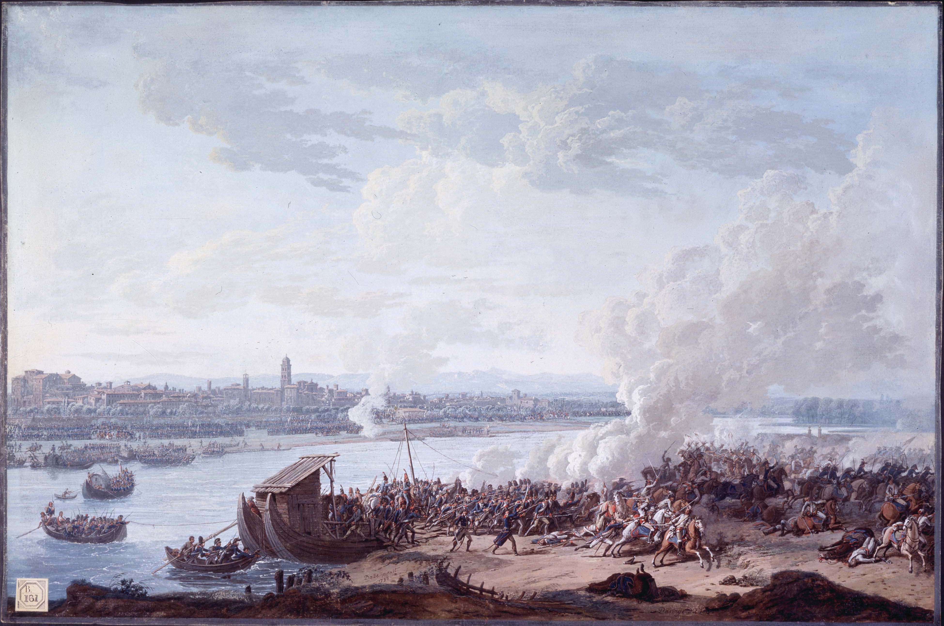 I francesi passano il Po a Piacenza, acquarel by Giuseppe Pietro Bagetti